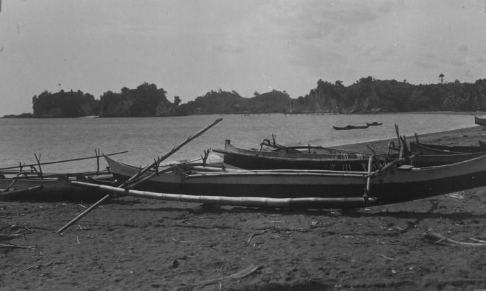 Foto. Prauwen op het strand te Kema